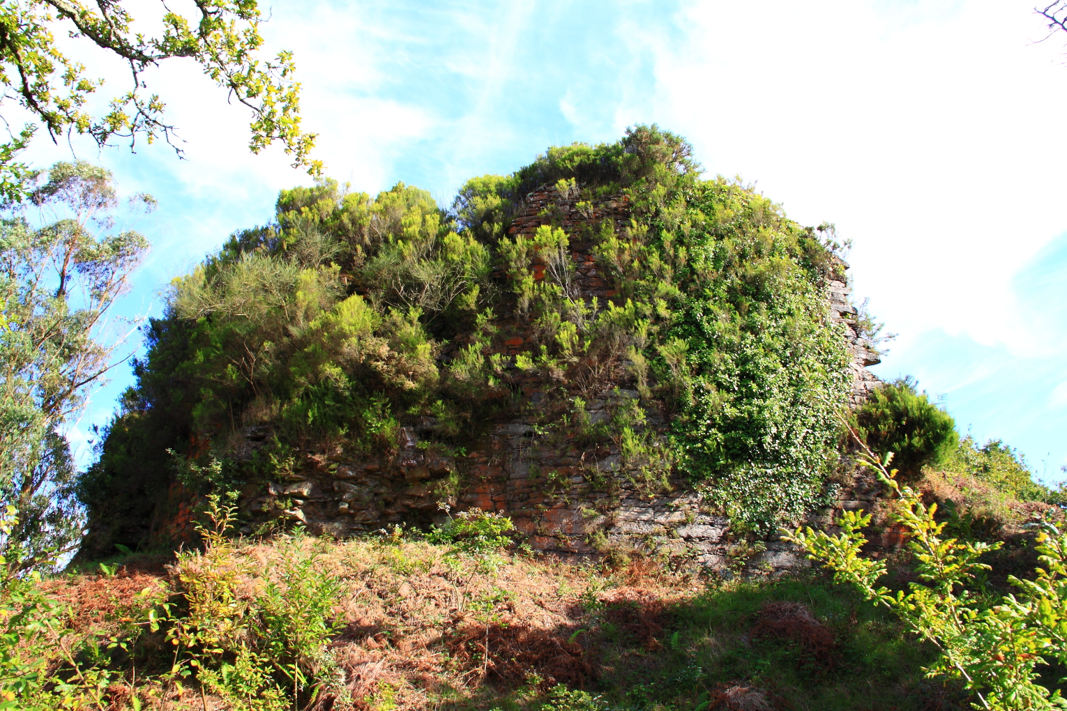 Ruinas del Castillo de Mesia